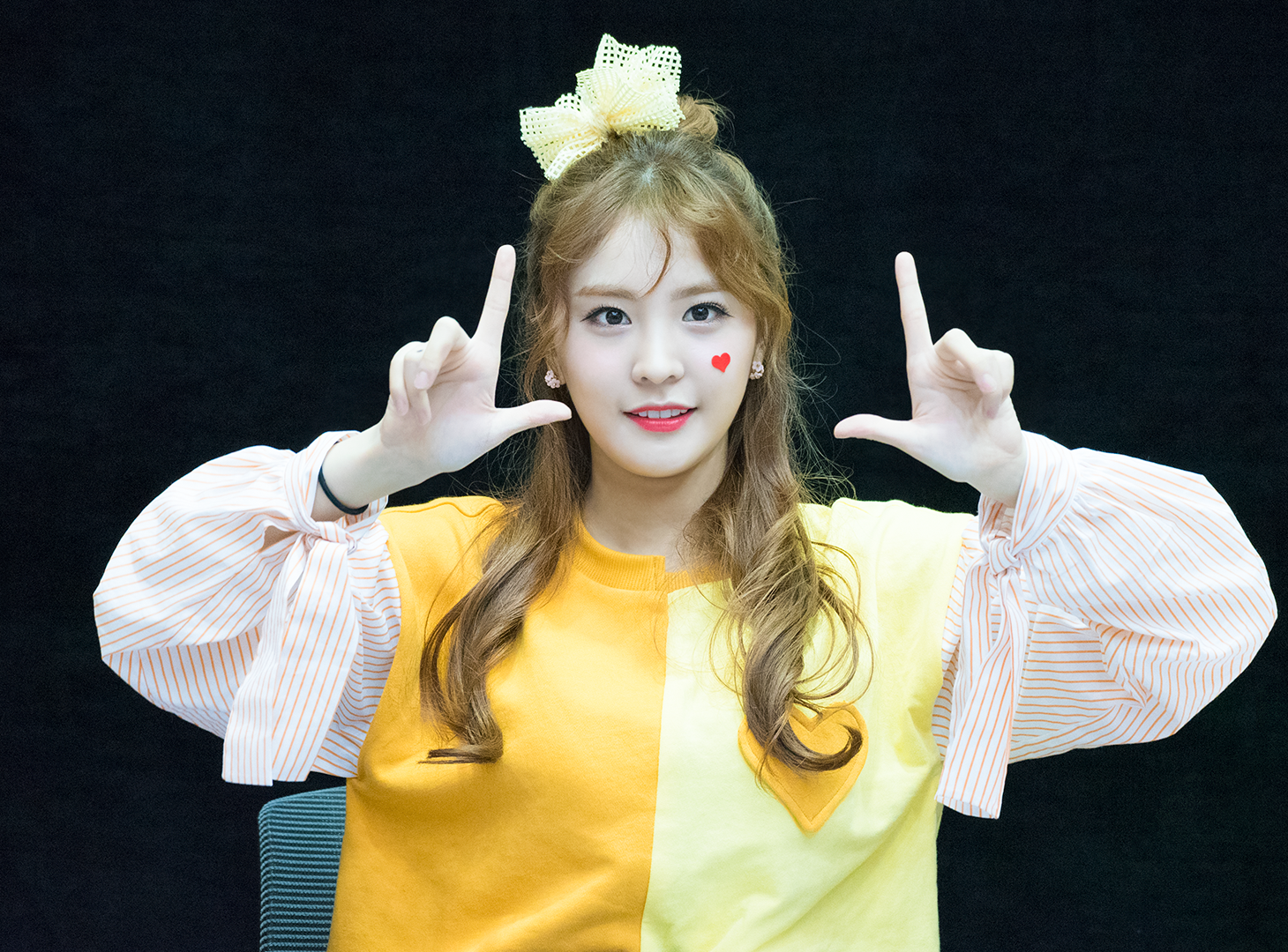 170219 소나무 (Sonamoo) 광주 팬사인회 - 나현 (NaHyun)